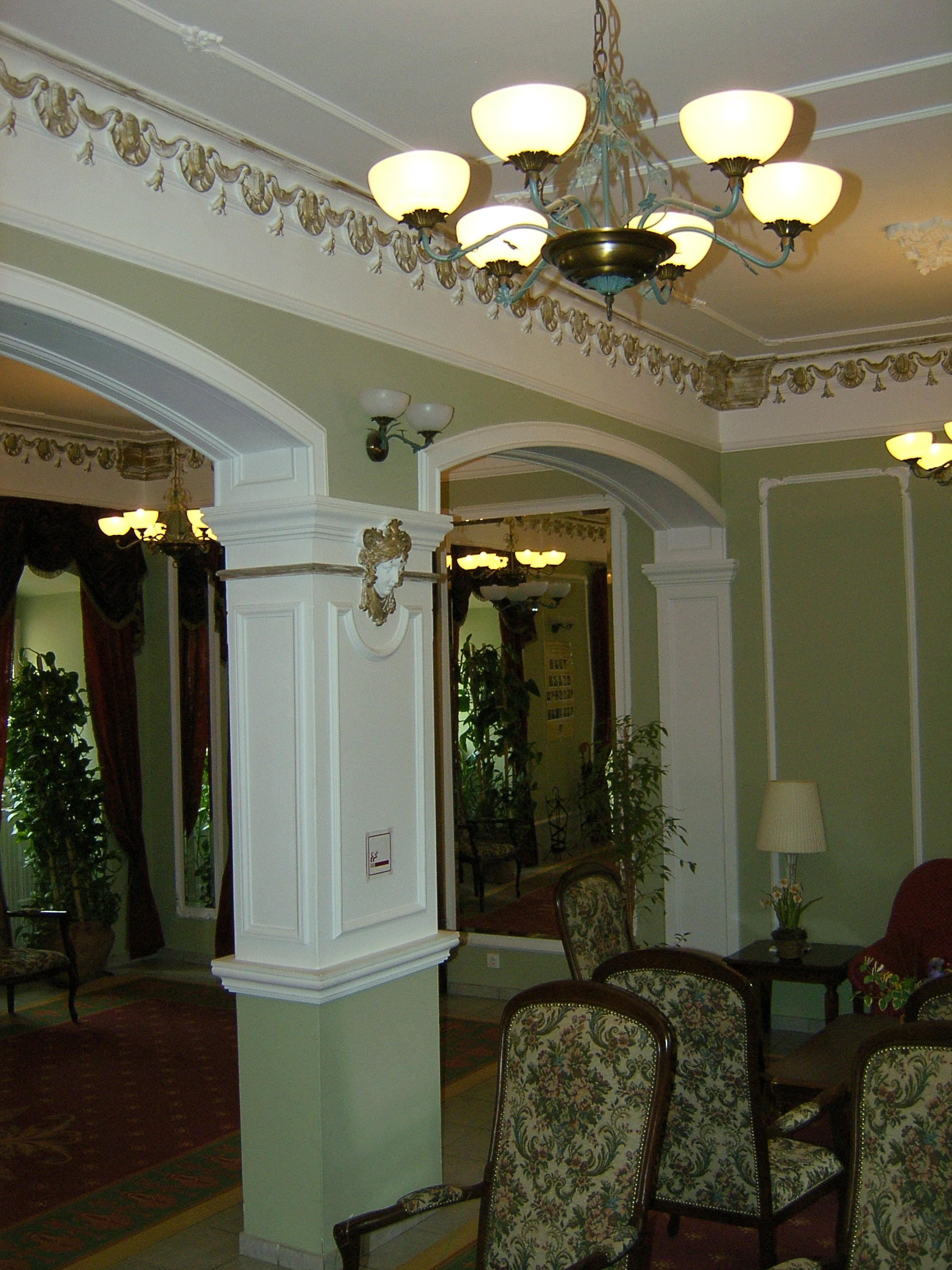 A Puchner-kastély előtere Bikalon (Baranya megye, Magyarország)